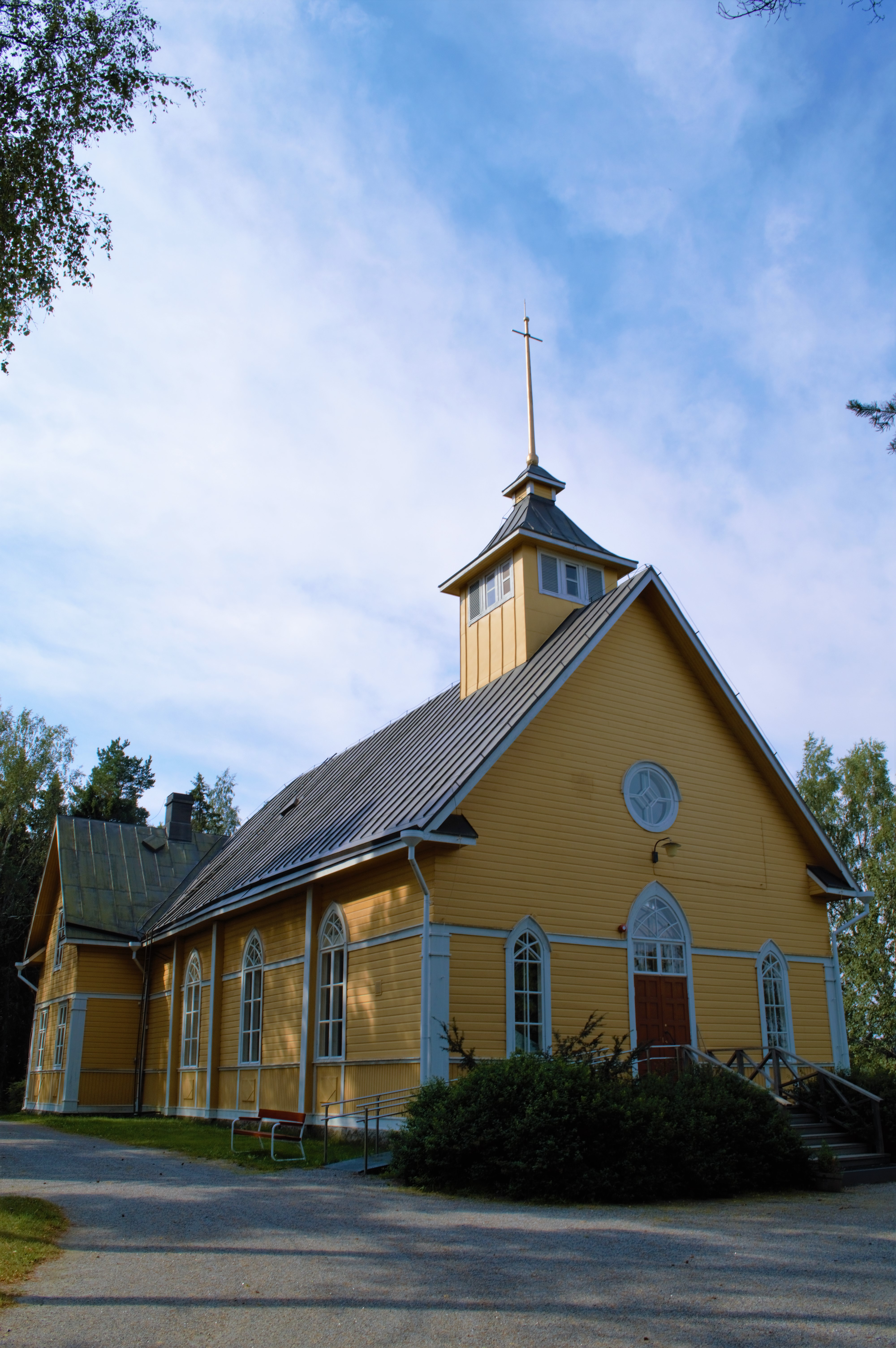 Sundomin kirkko